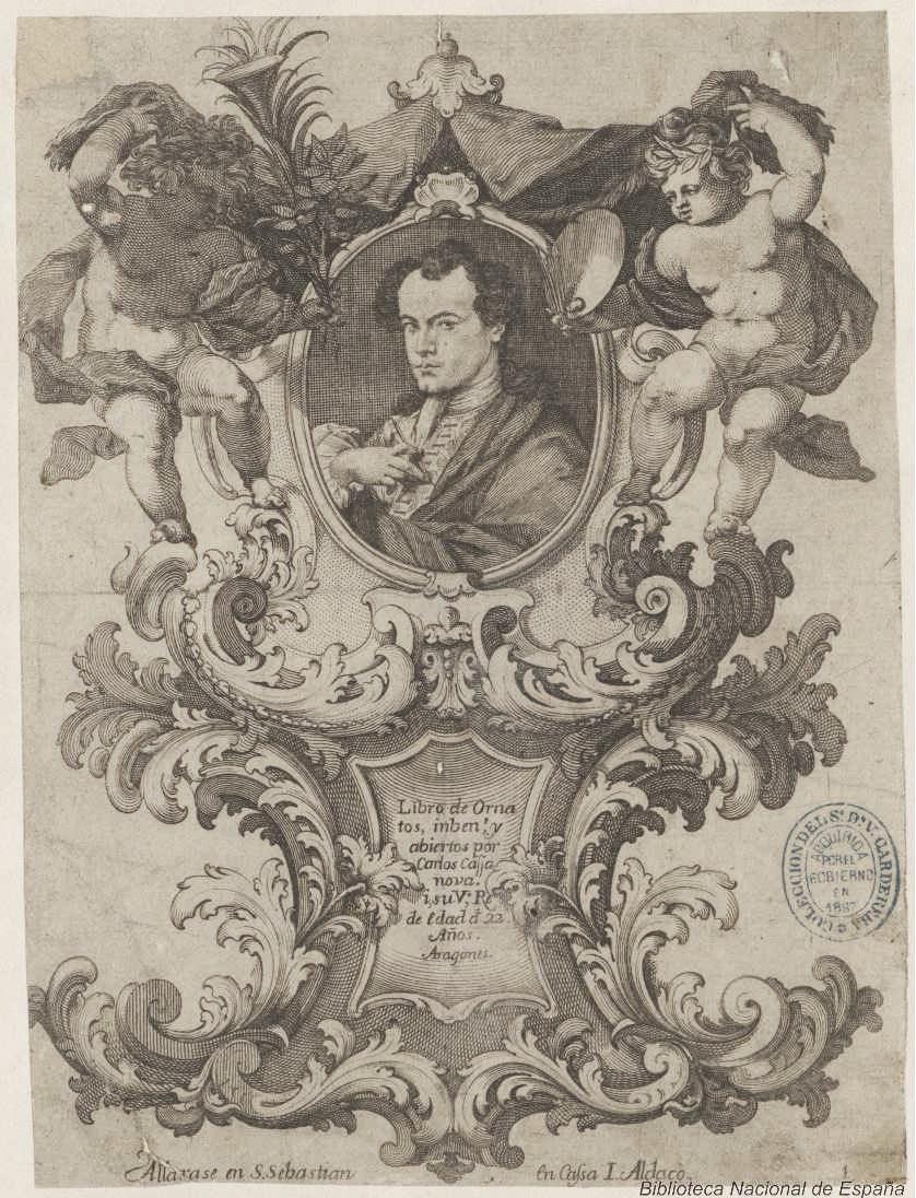 Autorretrato, ilustración del "Libro de Ornatos inb(entados) y abiertos por Carlos Cassanova i su V.º Reº de edad 22 Años, Aragonés